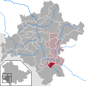 Neubrunn in Thuringia - District Schmalkalden-Meiningen